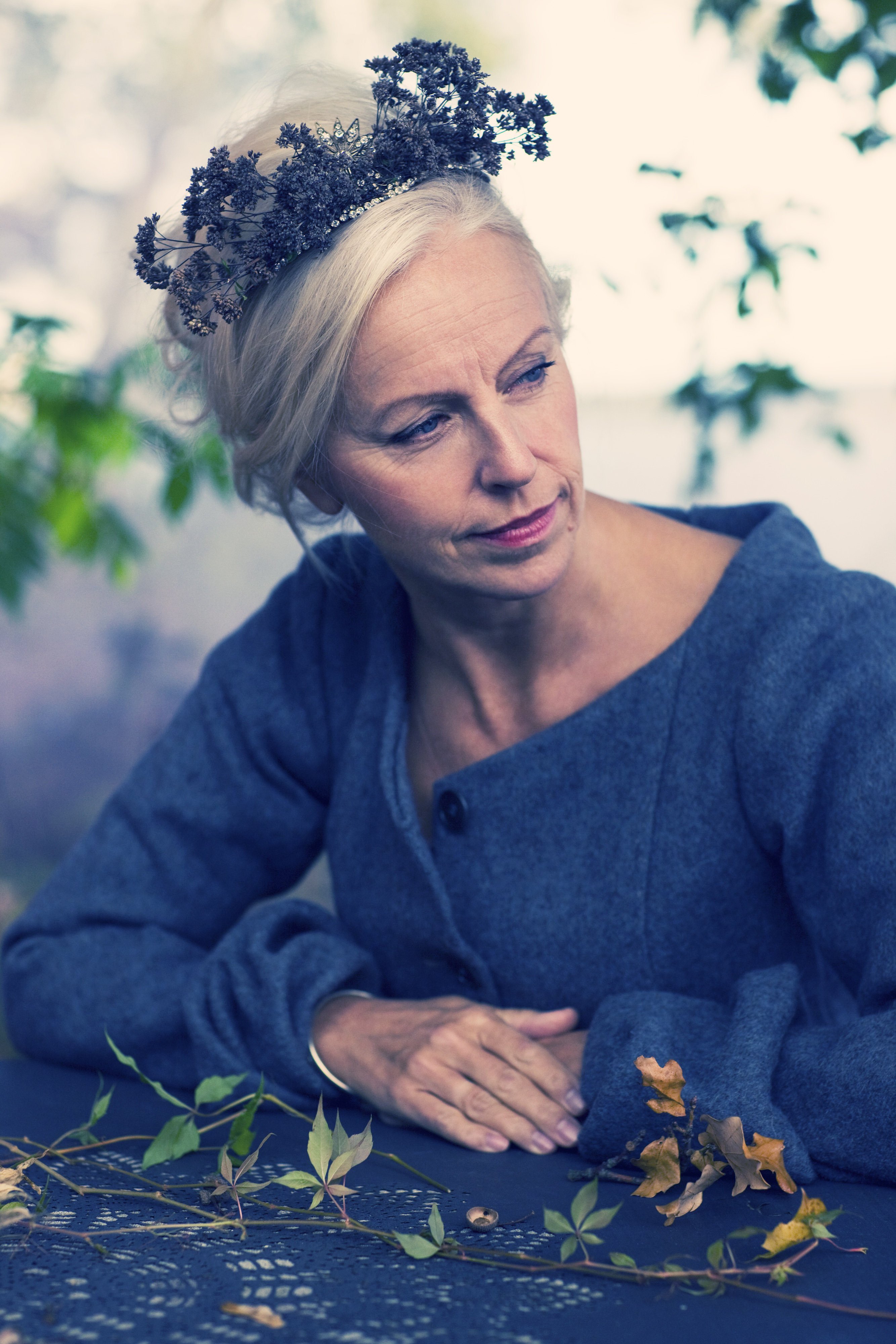 Operasångerskan Anne Sofie von Otter.